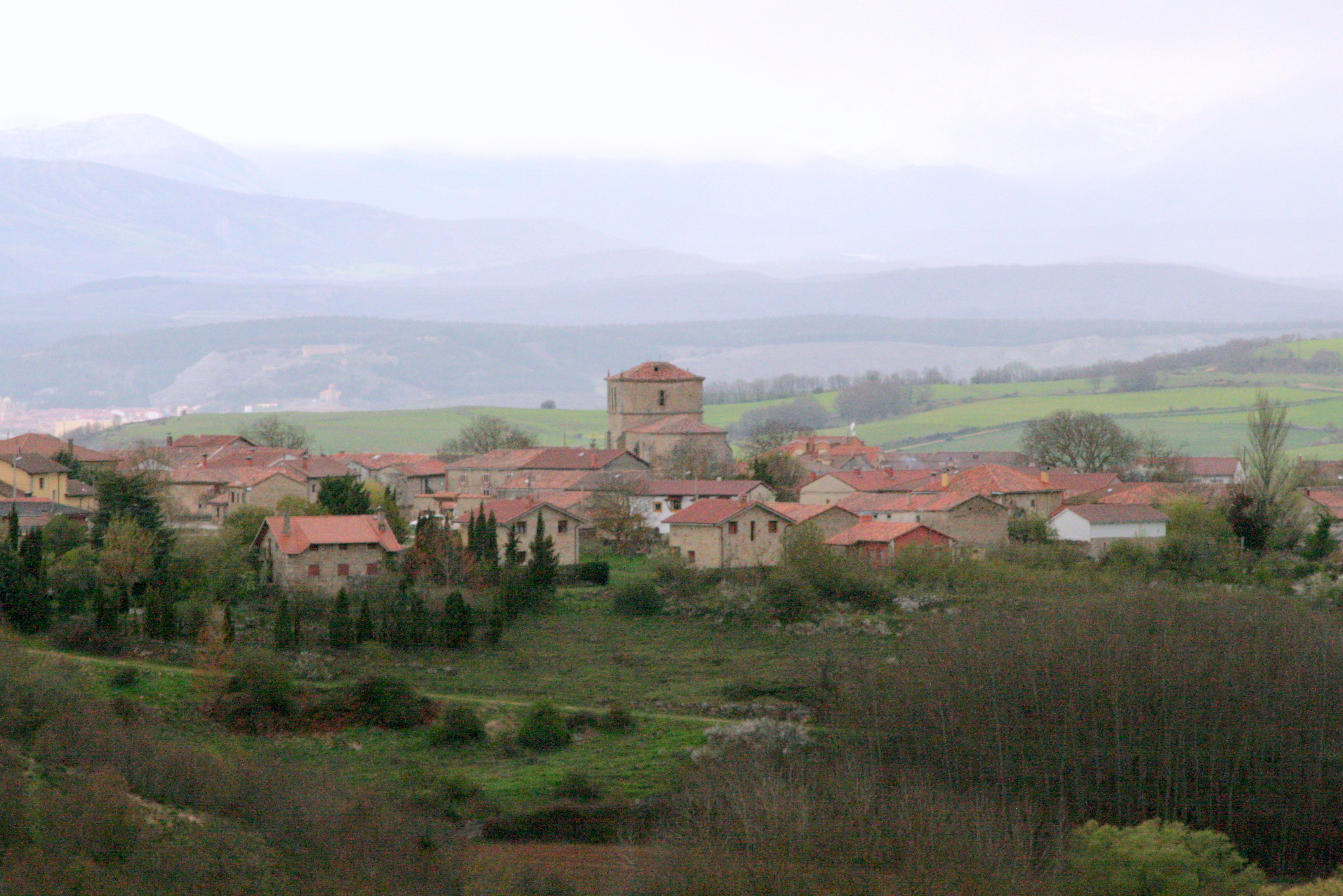 Vista de la pedanía de Revilla de Pomar (Pomar de Valdivia) desde Covalagua